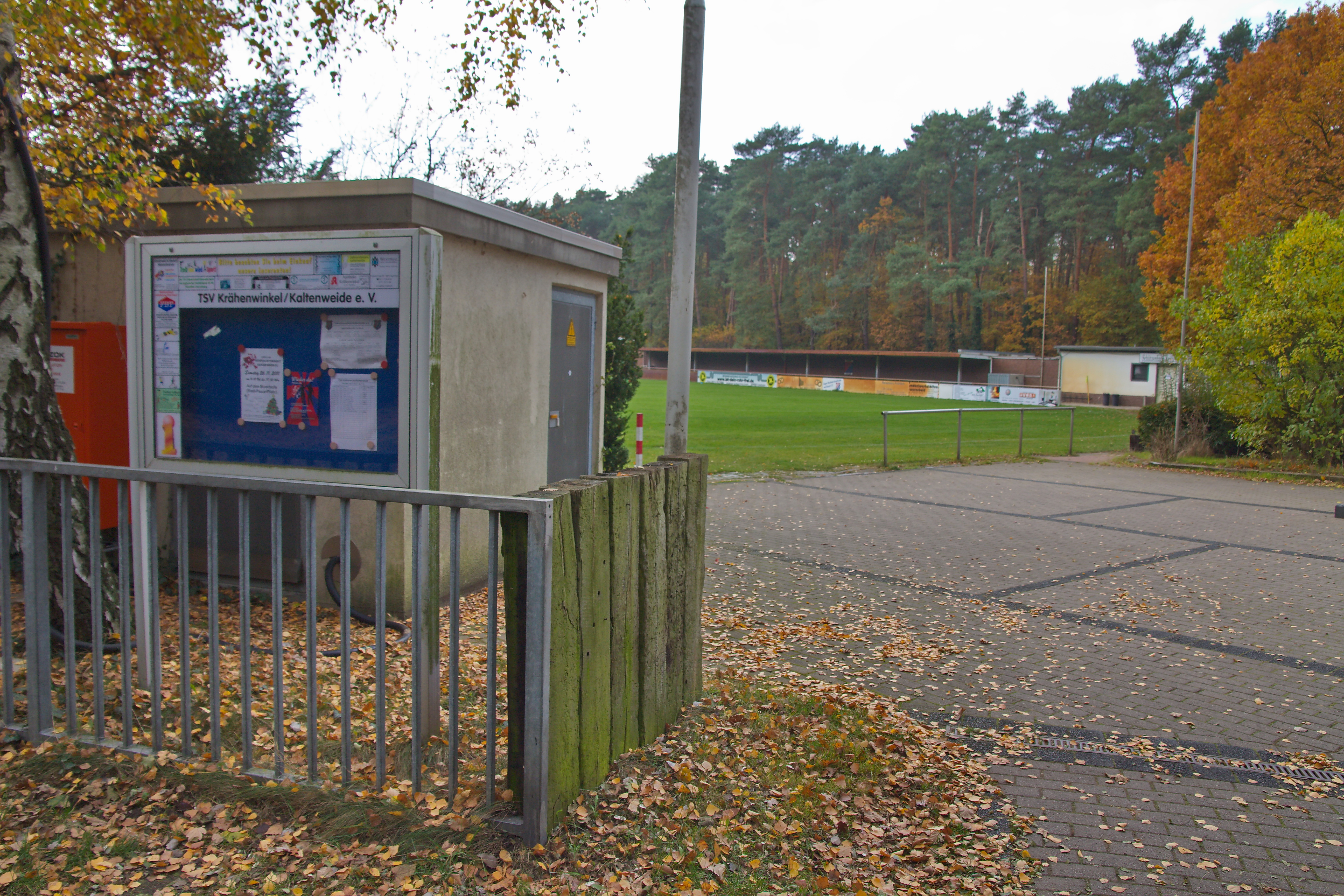 Blick auf den Sportplatz des TSV Krähenwinkel/Kaltenweide in Langenhagen, Niedersachsen, Deutschland